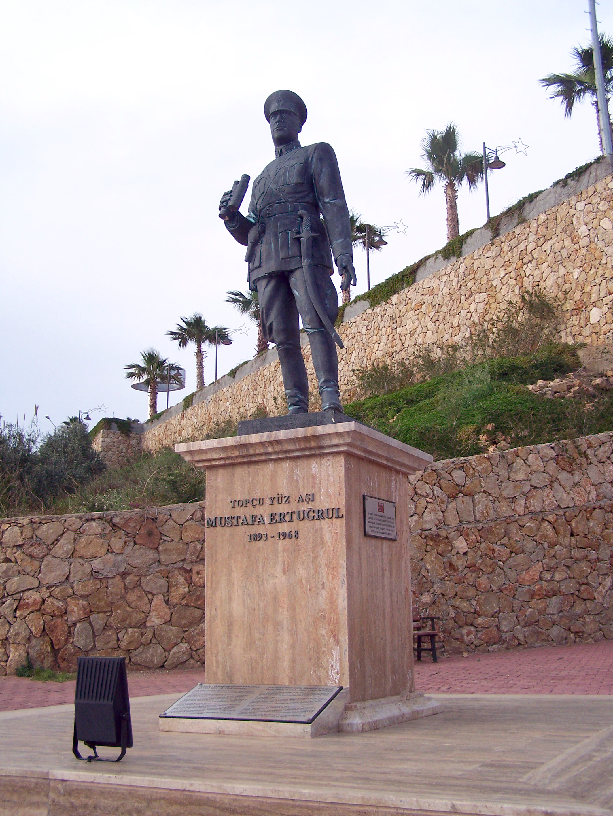 Statue of Mustafa Ertuğrul, made by Meret Öwezov in 2006, placed in Antalya at Atatürk Kültür Parki anlongside the Konyaaltı Caddesi at the opposite of Hızır Reis Caddesi.